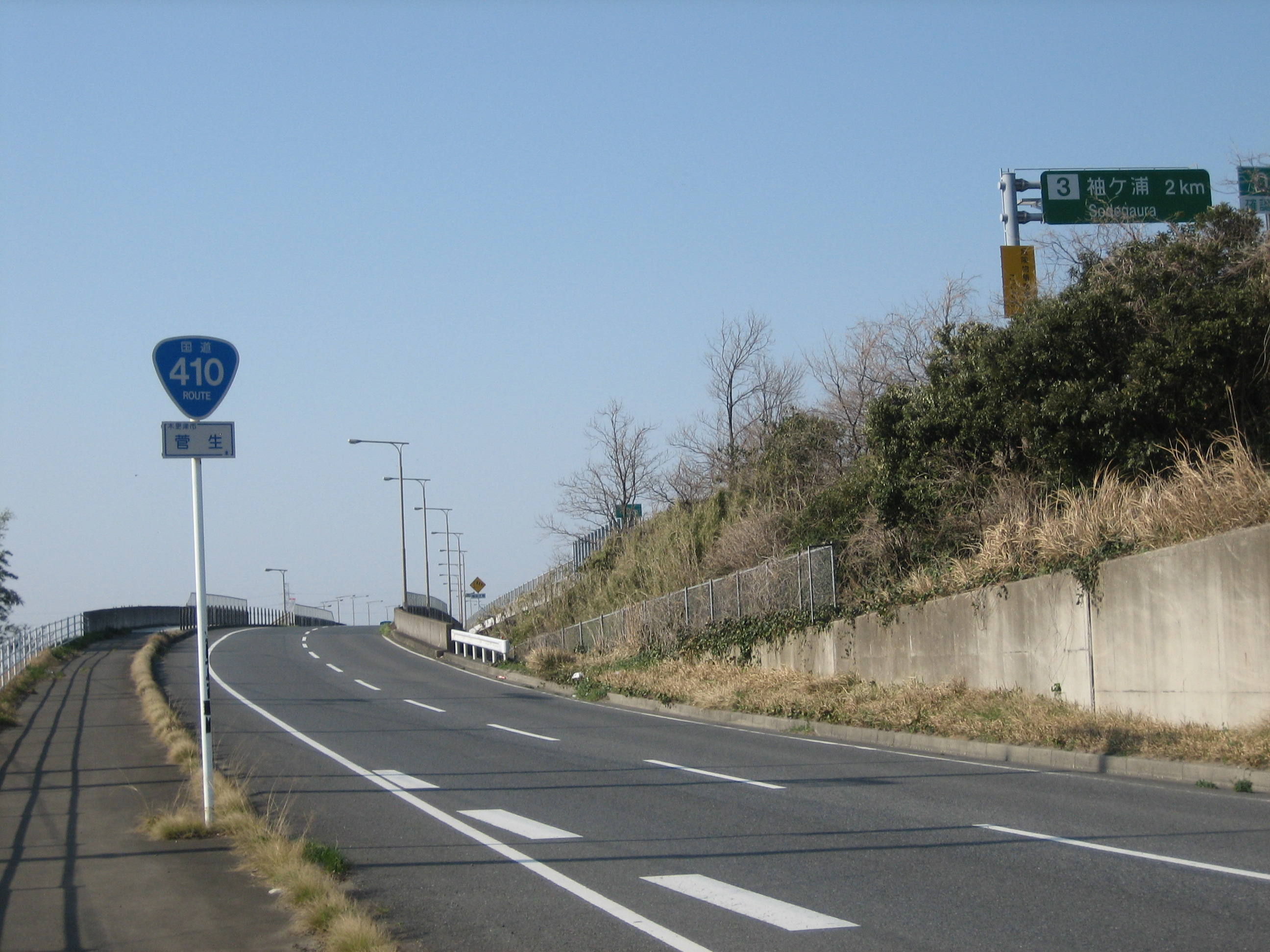 千葉県木更津市と館山市を結ぶ国道。海岸沿いから山間部を縦貫する。